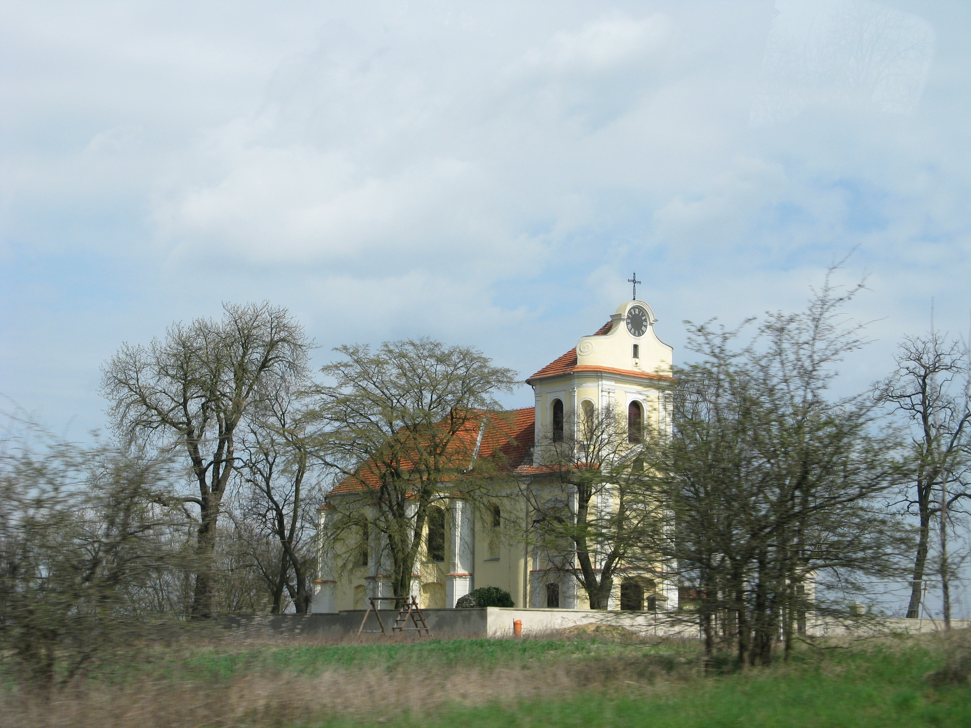 kościół parafialny pw. św. Mikołaja z lat 1770-1775 Siedlec 16, Kostrzyn